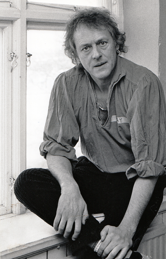 Kay Pollak under ett BUFF seminarium i Malmö 1987.